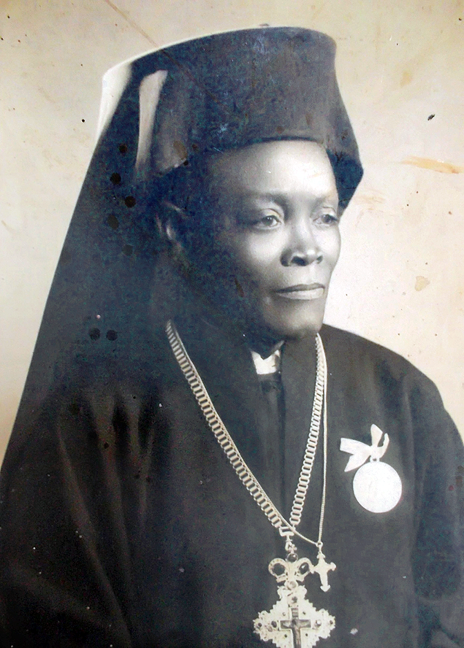 Священник Рувим Спартас